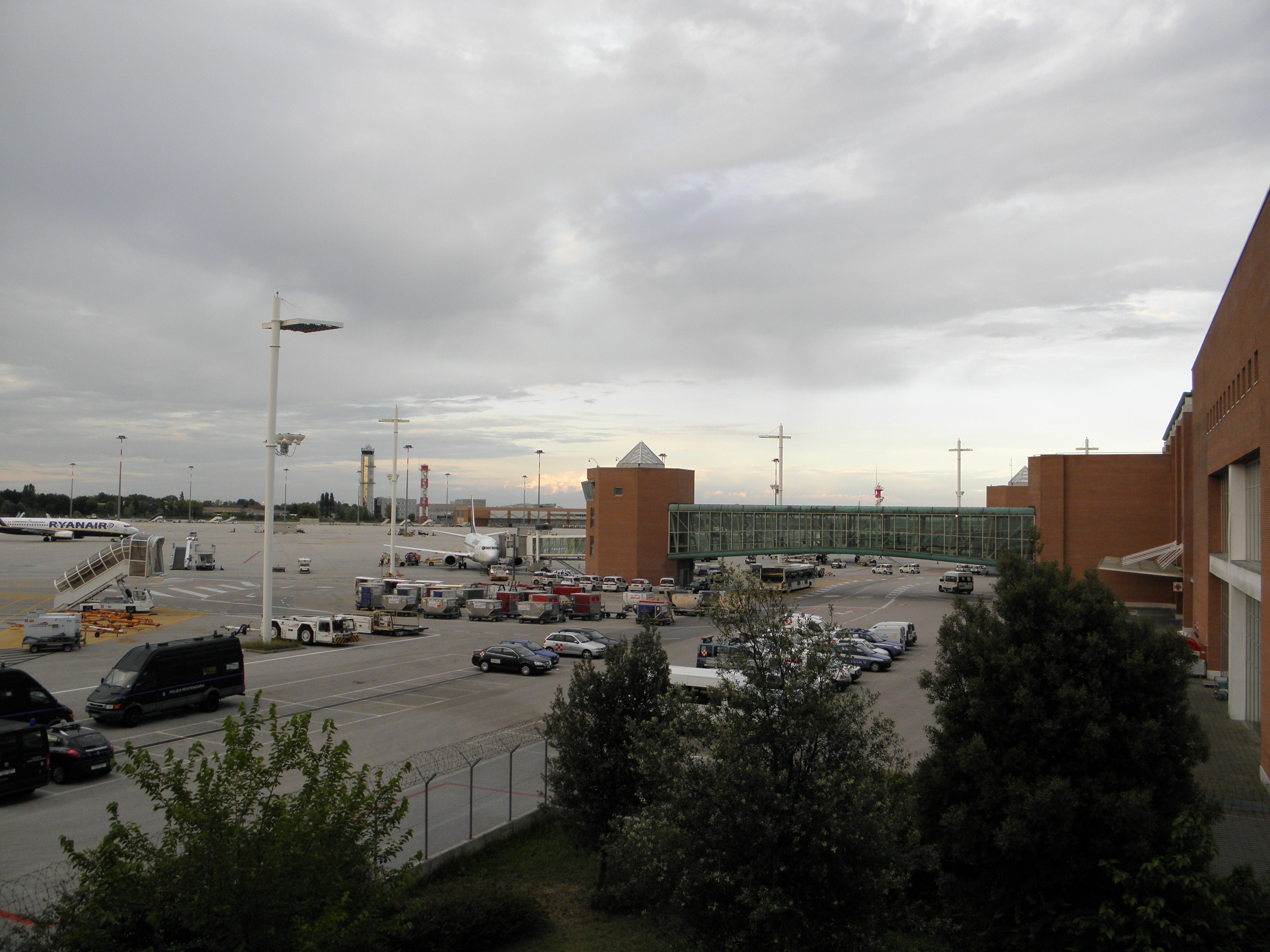 Aeroporto di Venezia-Tessera: piazzale.